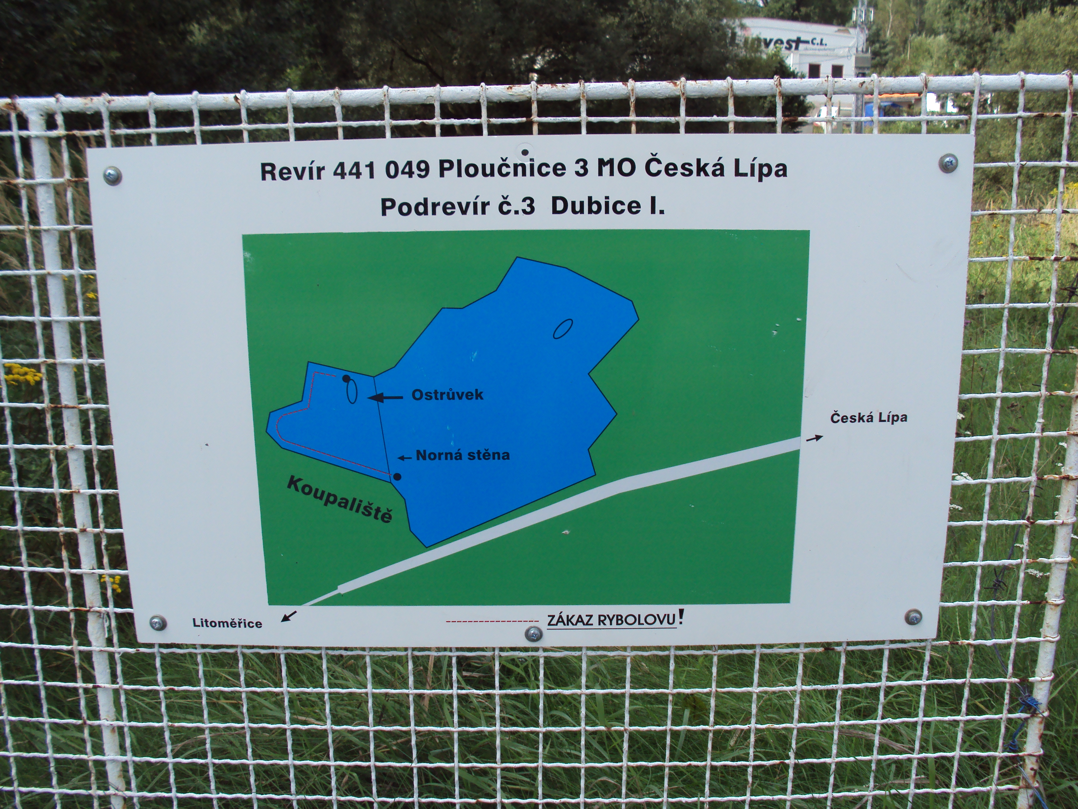 Přírodní koupaliště v Dubici - České Lípě je zároveň rybářským revírem